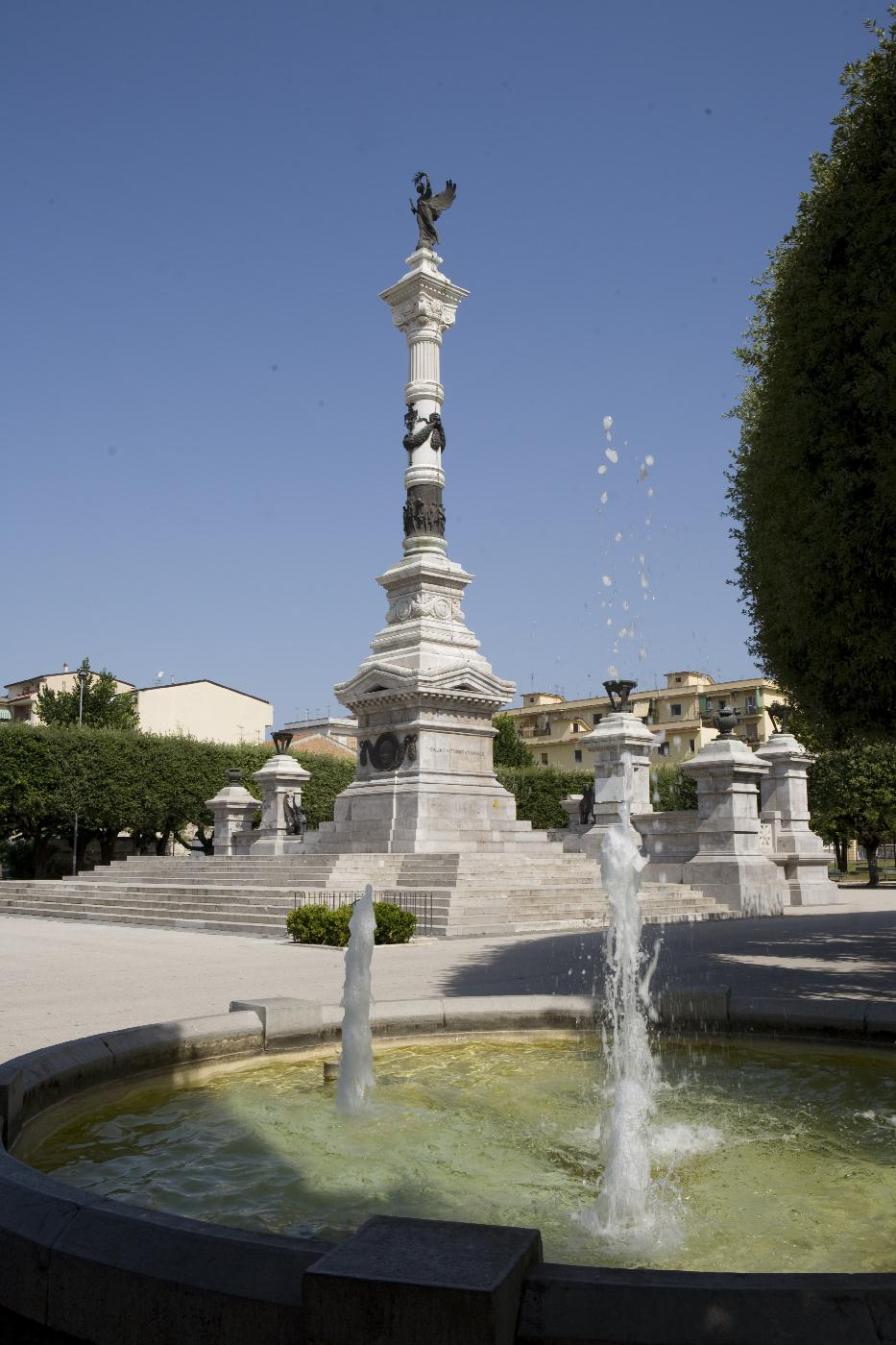 Monumento - Ossario dei caduti Garibaldini nella battaglia del "I Ottobre 1860" - Santa Maria Capua Vetere ( Caserta - Italia )